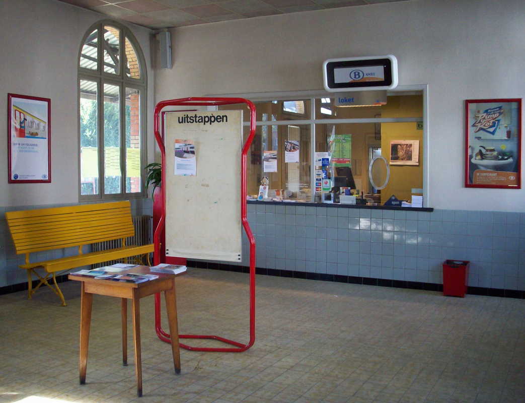 Station Zwijndrecht